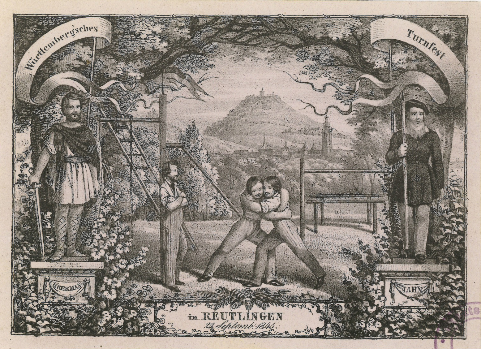 Württembergisches Turnfest in Reutlingen, 22. September 1845 (HStAS E 146 Bü 8468)